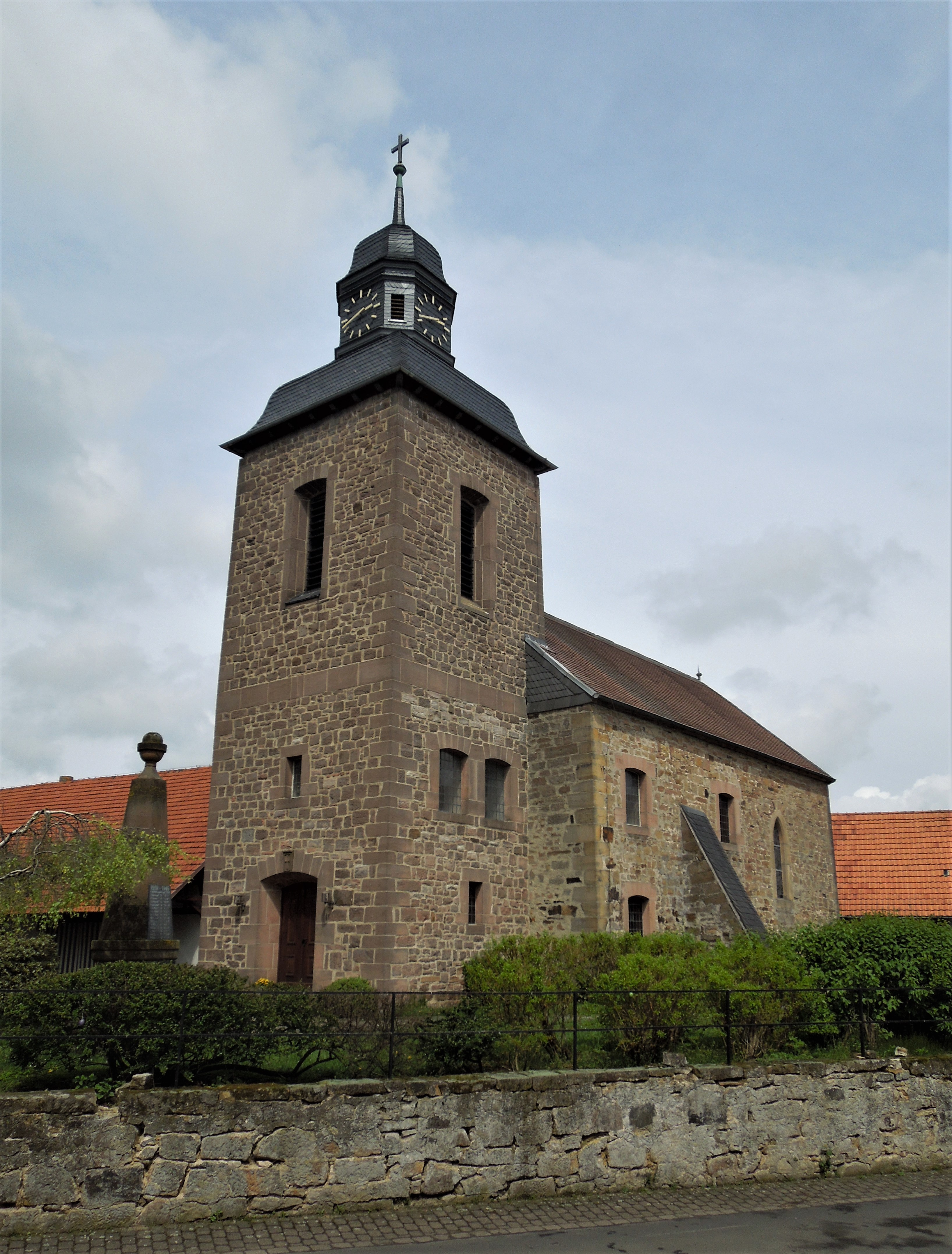 Gilserberg, ev. Dorfkirche von Nordosten; erbaut 1725